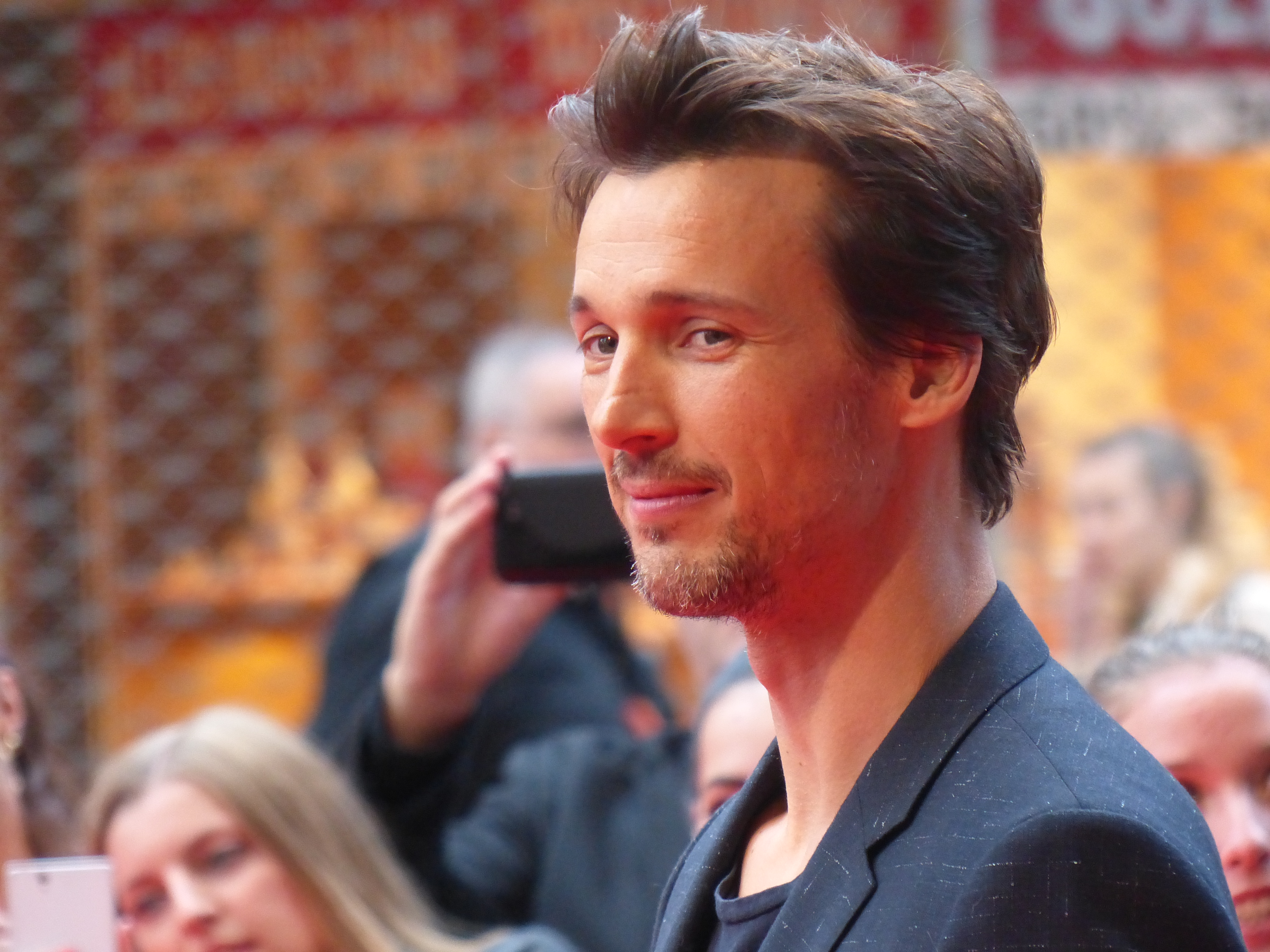 Deutschlandpremiere von "Die Lügen der Sieger - The Lies of the Victors" in der Lichtburg Essen am 08.06.2015.